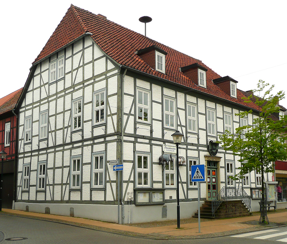 Vorsfelde, Langestrasse 21, Rathaus